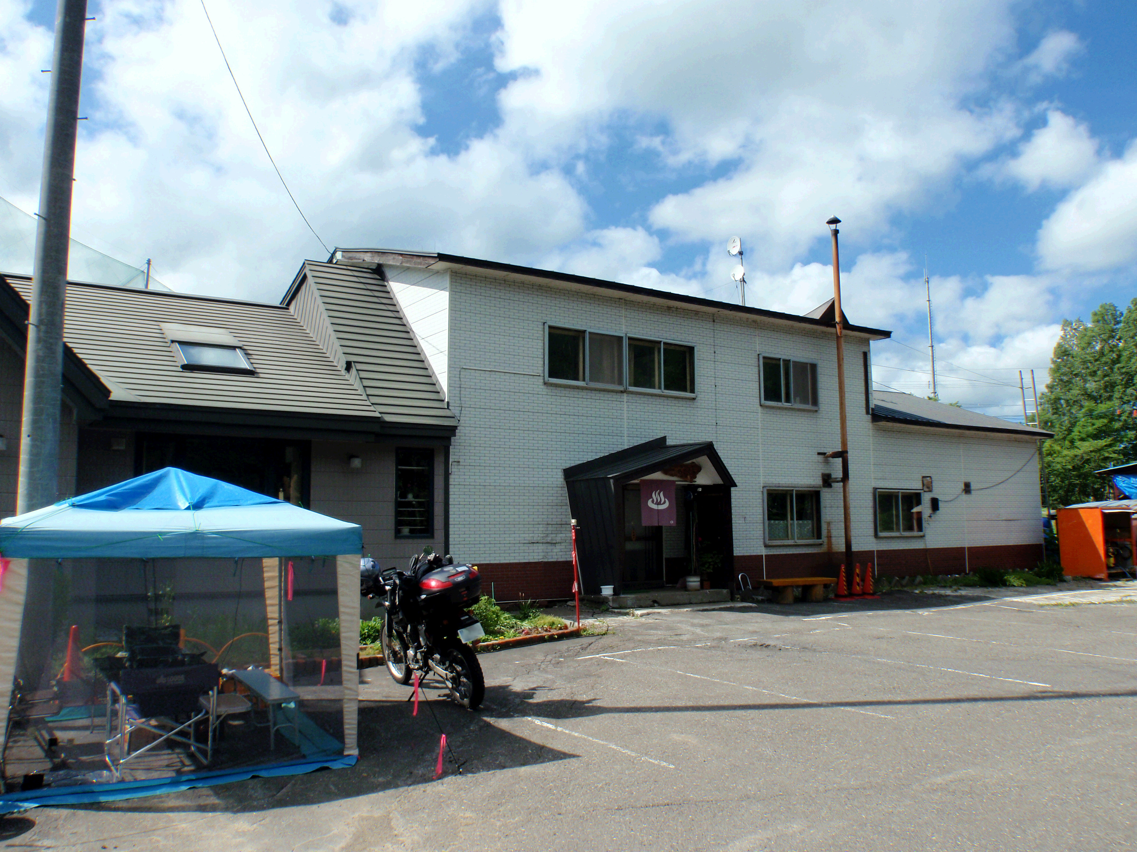 歌登温泉、民宿 浅倉温泉